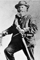 Santo Siorpaes